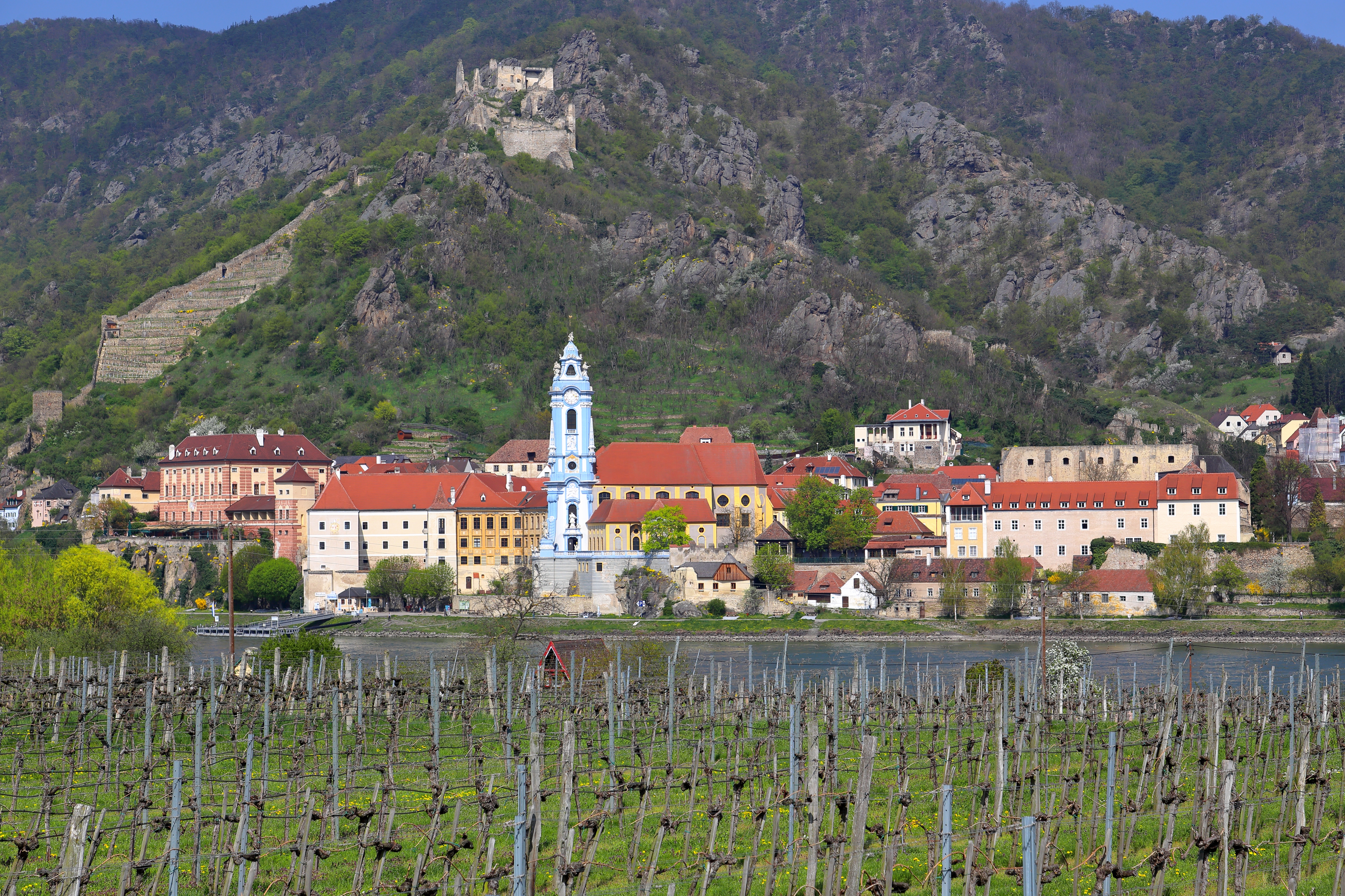 Südwestansicht des Ortskernes der niederösterreichischen Stadt Dürnstein.Links das Schloss Dürnstein mit dem blockhaften Hauptbau. Das Schloss wurde in der 1. Hälfte des 17. Jahrhundert errichtet und in den 1960er Jahre zu einem Hotel umgebaut. Im Bildzentrum das 1410 gegründete und 1788 aufgelöste Augustiner Chorherrenstift Dürnstein. Der markante Kirchturm hat eine mittelalterliche Bausubstanz aus der 1. Hälfte des 15. Jahrhunderts. In der ersten Hälfte des 18. Jahrhunderts wurde der Turm vom Baumeister Josef Munggenast neu gestaltet und barockisiert. Am oberen Bildrand die Reste der Mitte des 12. Jahrhunderts errichteten Burg. Sie wurde 1645 von den Schweden geplündert und zerstört. Rechts im Bild das von Leutold I. von Kuenring 1289 gestiftete Klarissinnenkloster. Im Jahr 1573 erfolgte die Klosteraufhebung und Ende des 16. Jahrhundert wurde die Klosterkirche zu einem Schüttkasten umgebaut, wobei man den blockartigen Bau bis zur Gewölbezone abtrug.